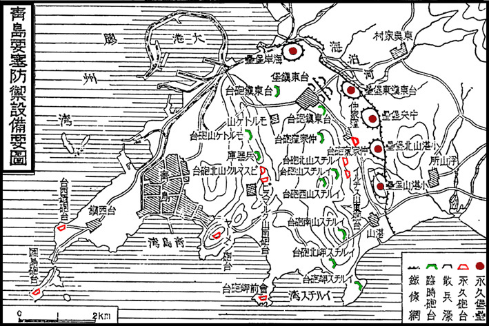 青島要塞防禦設備要圖